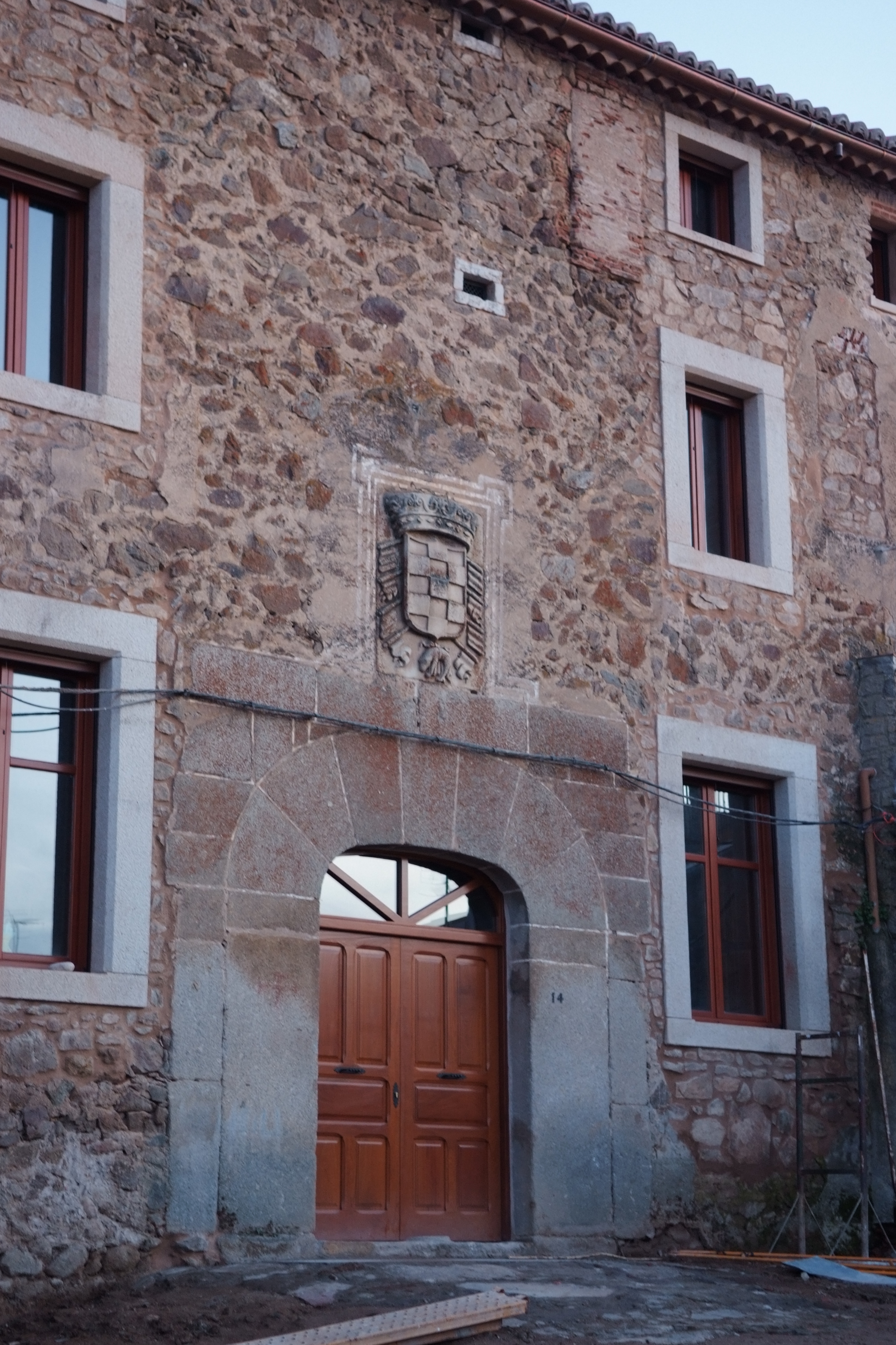 Convento de Aldeanueva de Santa Cruz (Ávila; España)